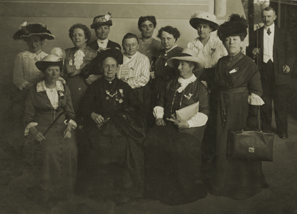 Světový kongres pro volební právo žen v Budapešti, 1913 Depicted: seated (l-r): Tekla Hultin (Finland), Belva Lockwood (United States), Anita Augspurg (Germany) standing (l-r): Leopolda Kulka (Austria), Zdeňka Wiedermannová-Motyčkova (Moravia), Marie Tůmová (Bohemia), Anna Šchŏntagová (Bohemia), Vil. Mohr (Germany), Maria Moravcová-Štěpánková (Bohemia), Elsa Beer-Angerer (Austria), Berta Englová, and Nagy Susany.